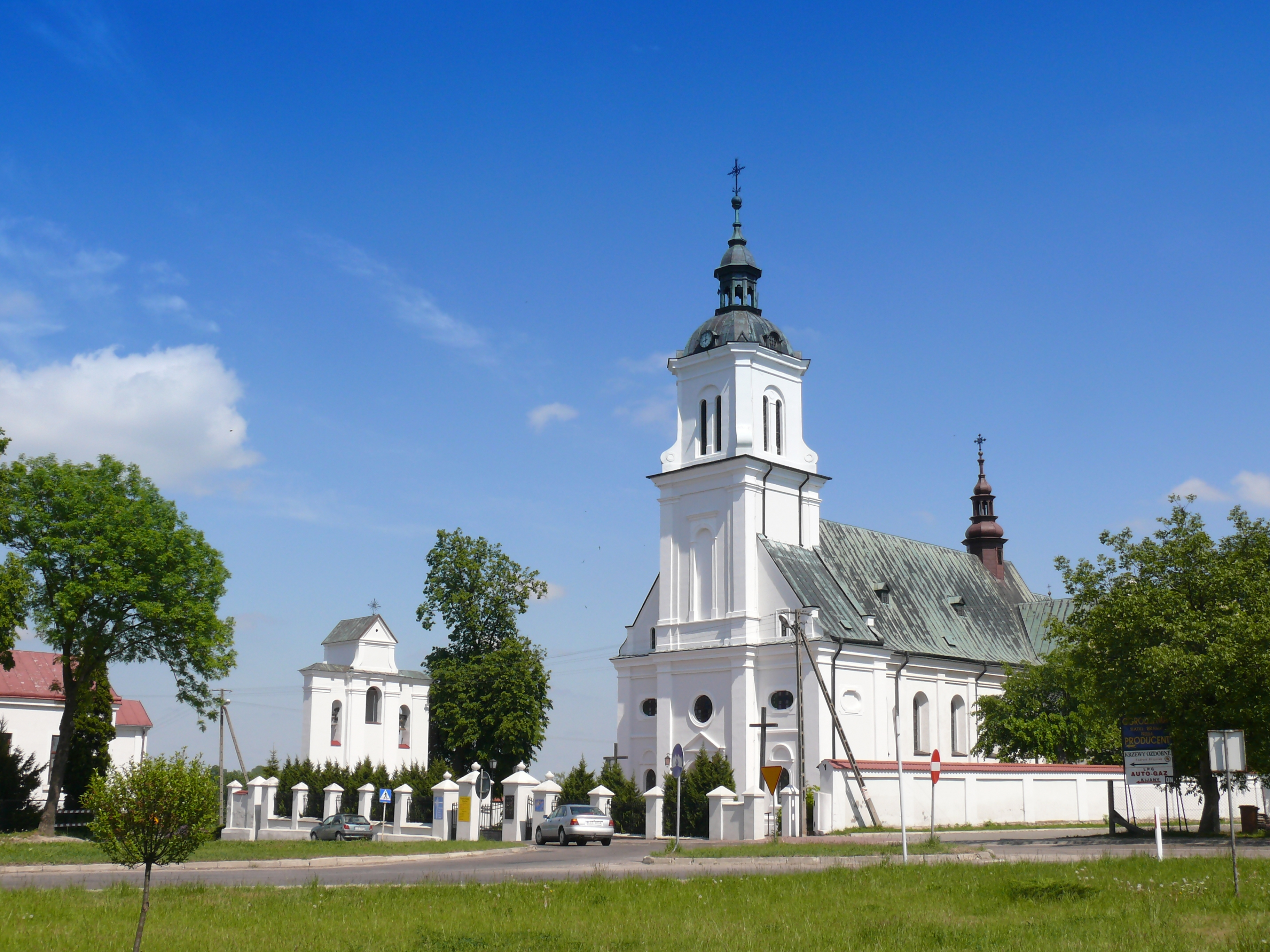 Kościół p.w. św. Anny w Kijanach (zabytek nr rejestr. A/581)